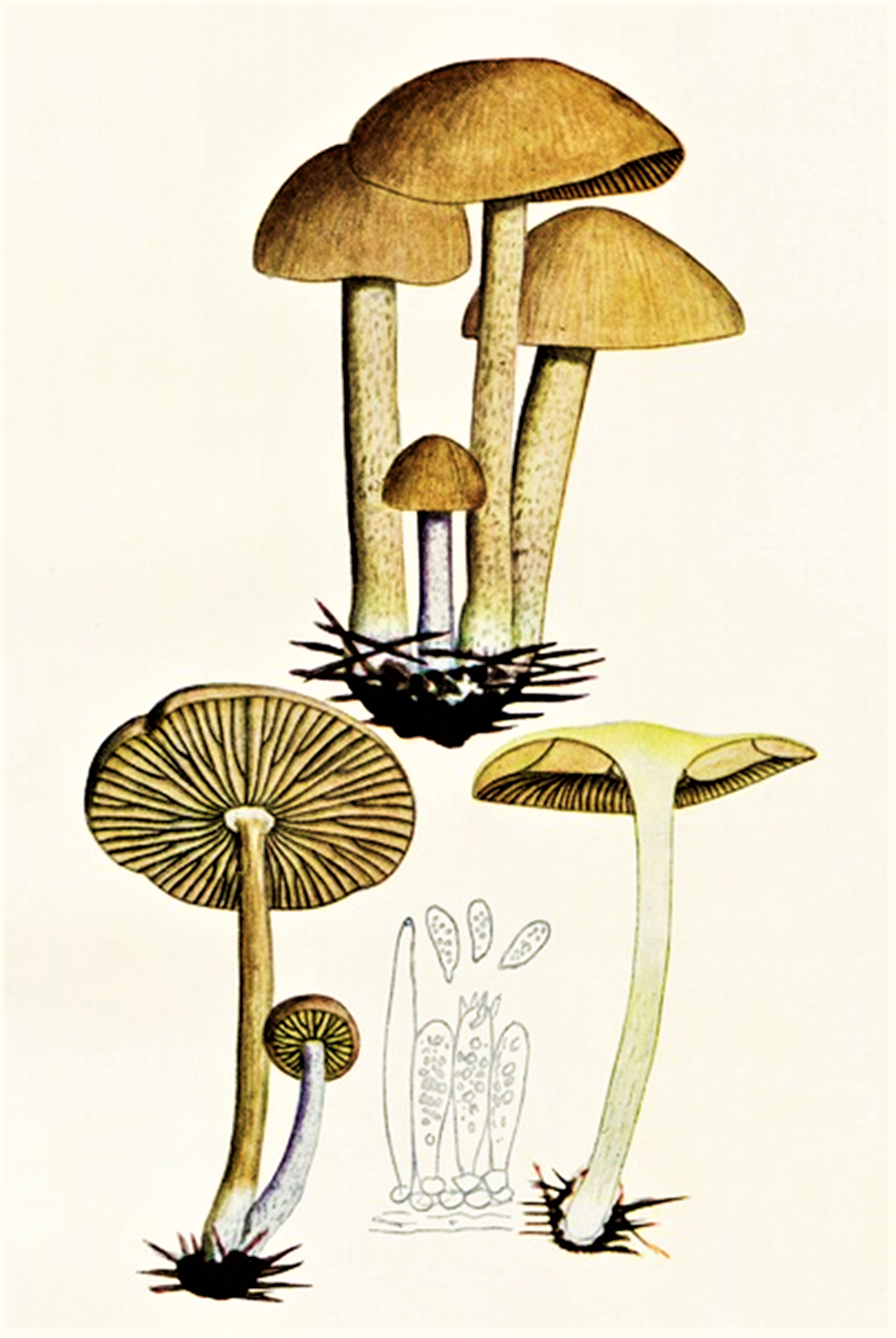 Marasmius urens (Bull.) (1791) Fr. (1836), heute Gymnopus peronatusus (Bolton, 1788) Gray (1821)